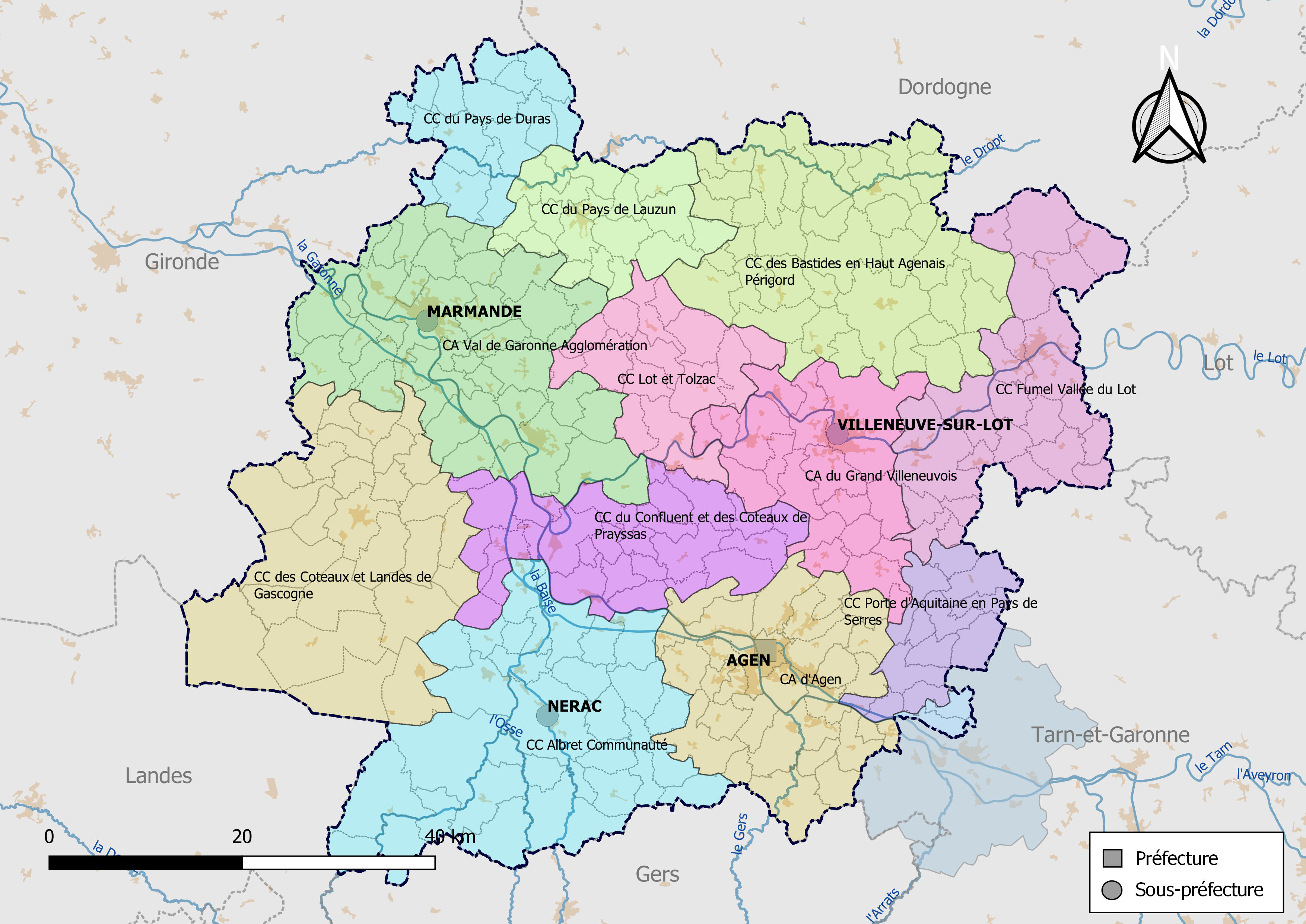 Carte des intercommunalités du département de Lot-et-Garonne, France. Composition au 1er janvier 2019.